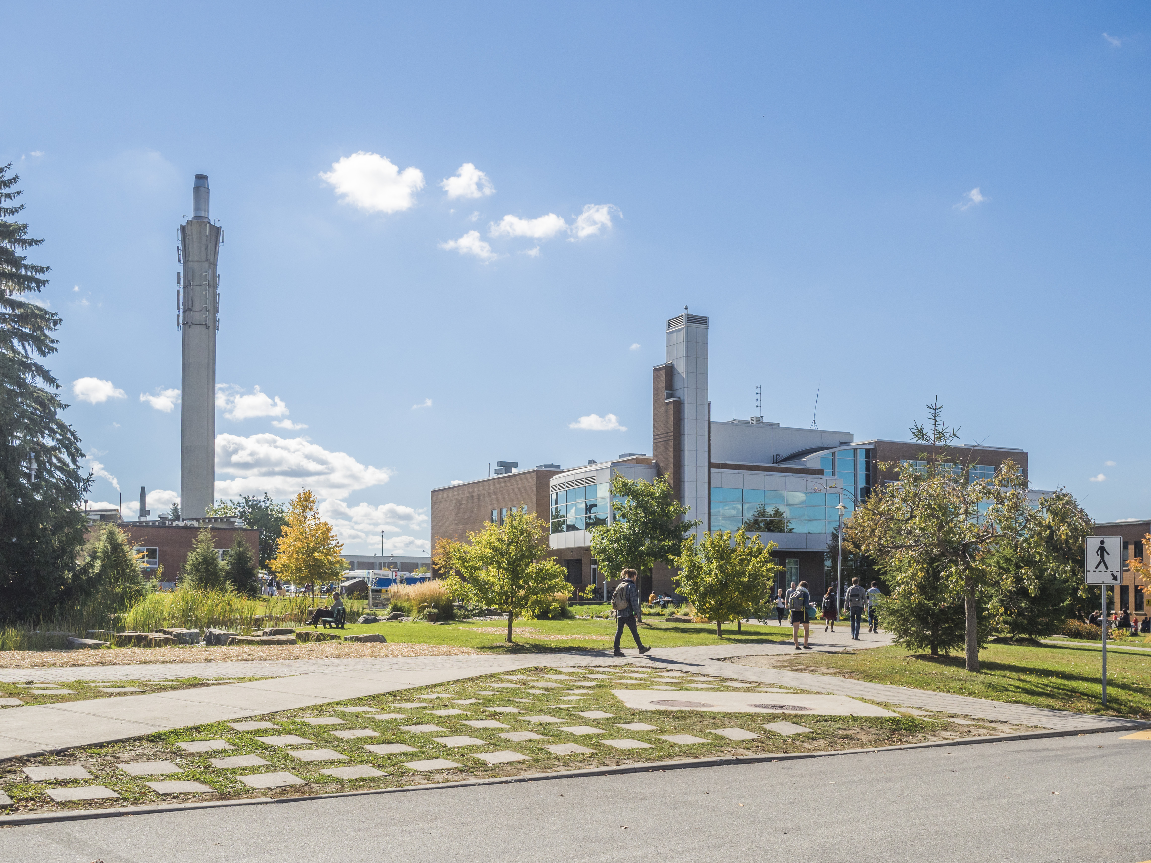 Situé au Campus principal, le Pavillon multifonctionnel abrite une cafétéria, la Coopérative de l'Université, le Centre de gestion des déplacements et plusieurs autres services.